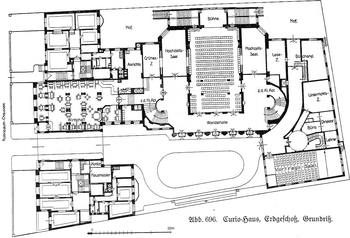 Grundriss des Curiohauses in der Rothenbaumchaussee aus "Hamburg und seine Bauten" von 1914.